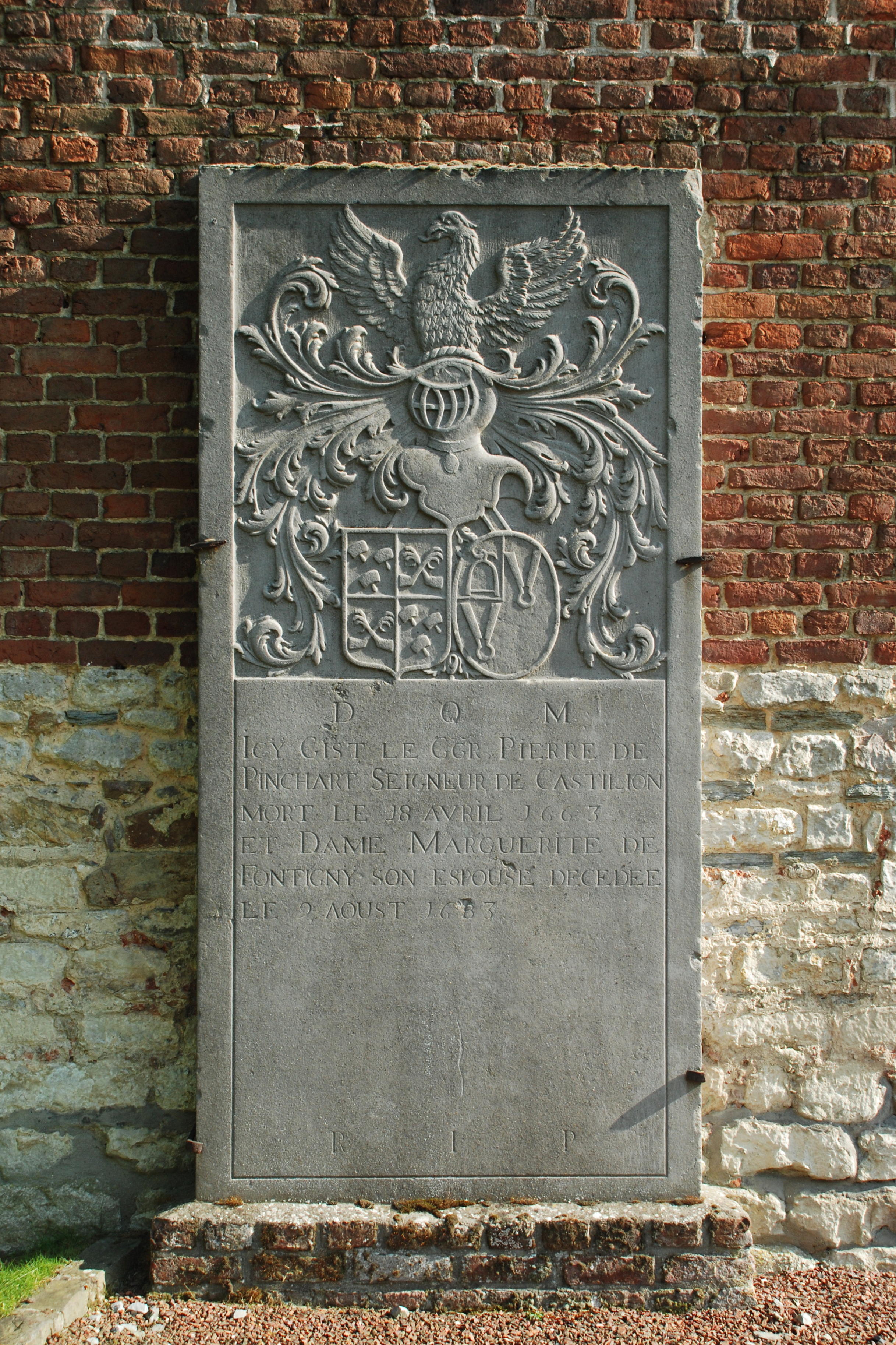 Belgique - Brabant wallon - Mont-Saint-Guibert - Église Saint-Pierre de Corbais - Dalle funéraire de Pierre de Pinchart